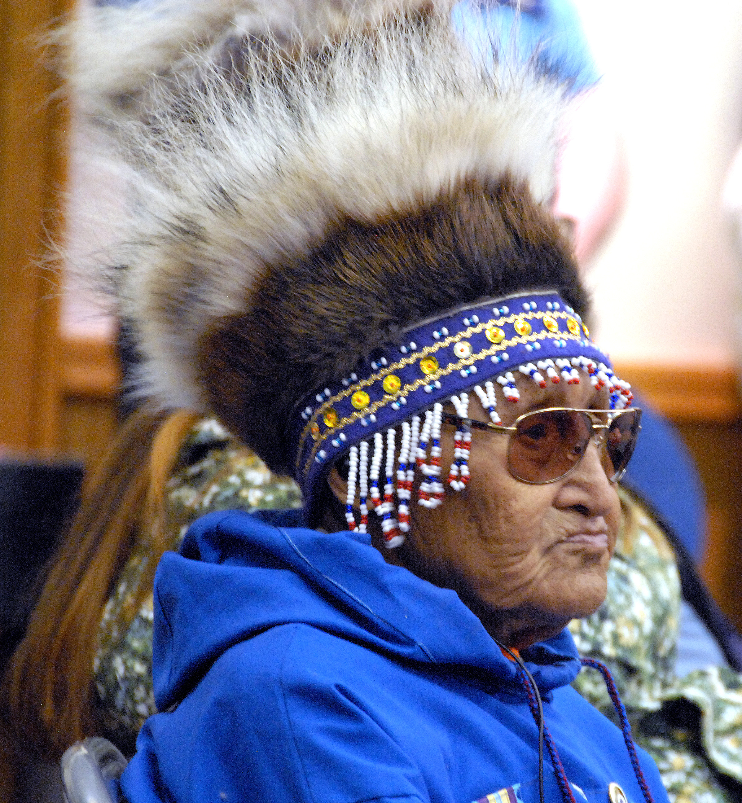 Rural Tour Alaska Aug 2009